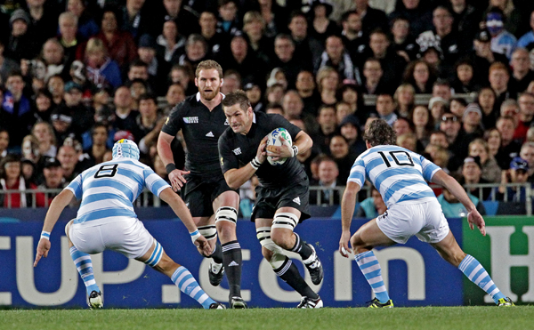 COUPE DU MONDE DE RUGBY 2011 NOUVELLE ZELANDE ARGENTINE